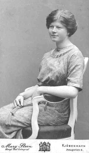 Hanka Schjelderup, verh. Schjelderup Petzold, norwegisch-deutsche Pianistin, Sängern und Musikpädagogin, Ehefrau von Bruno Petzold